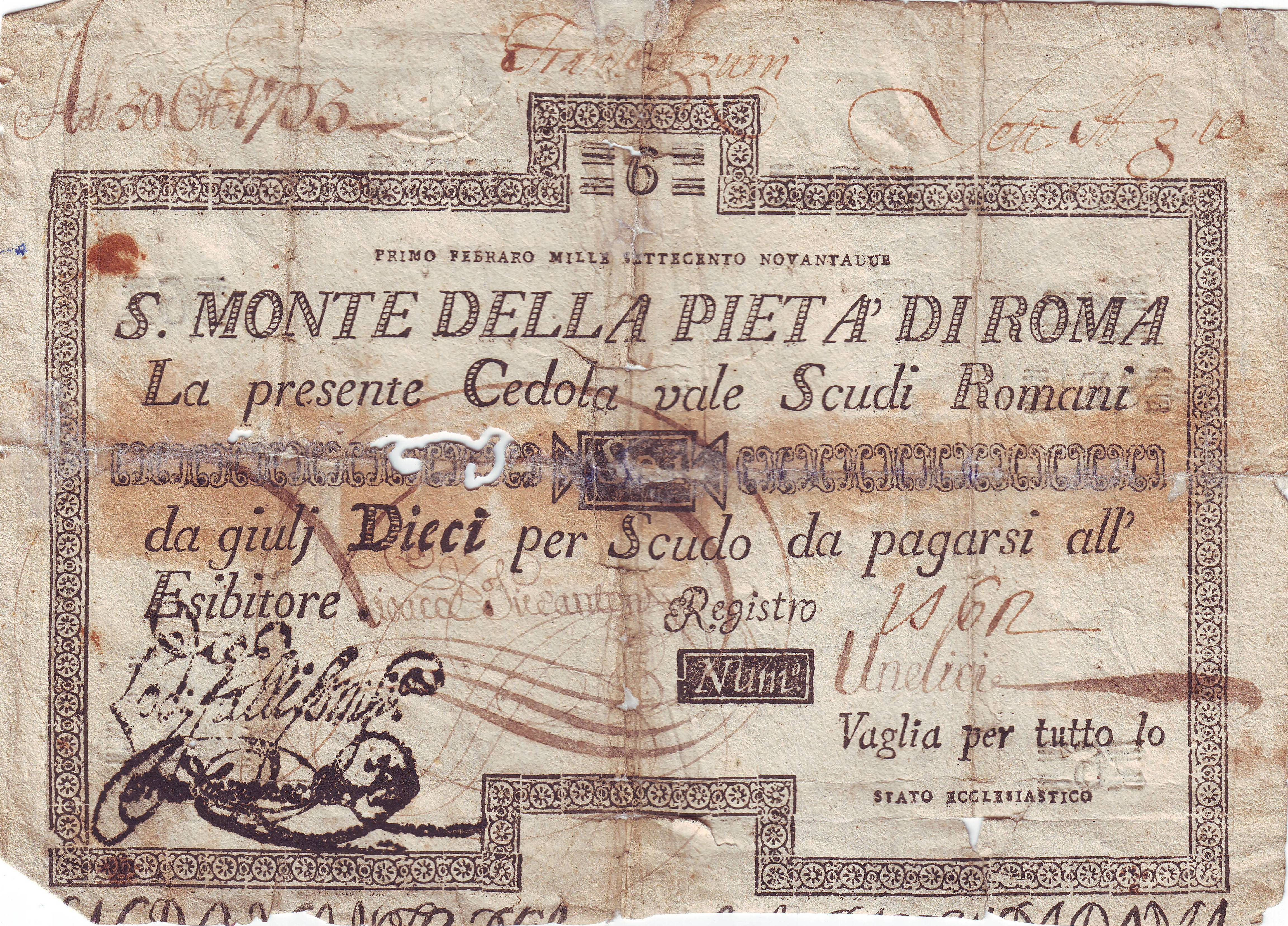 Cedola emessa dal S. Monte di Pieta' di Roma